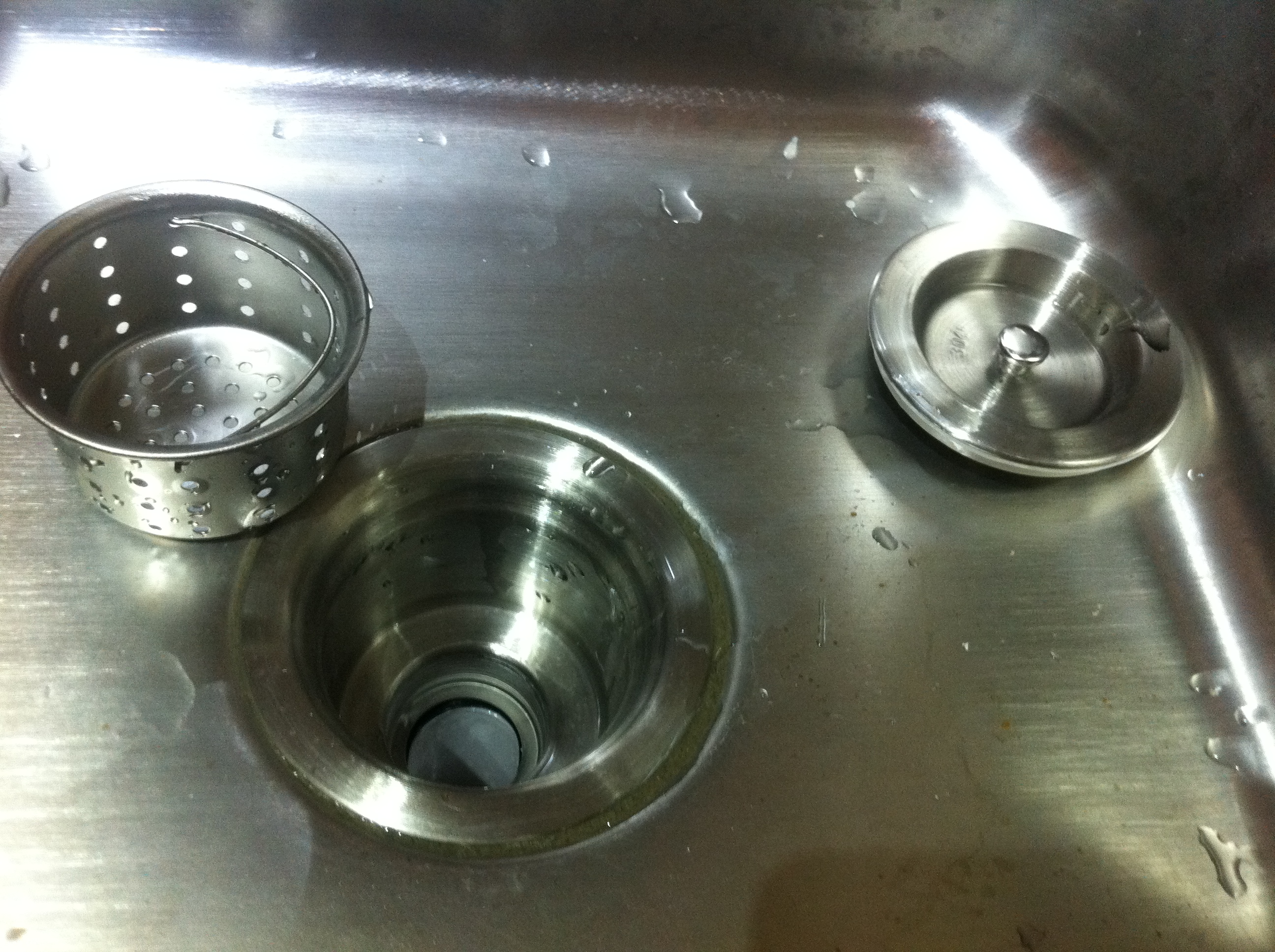 中文（香港）: 洗滌盤